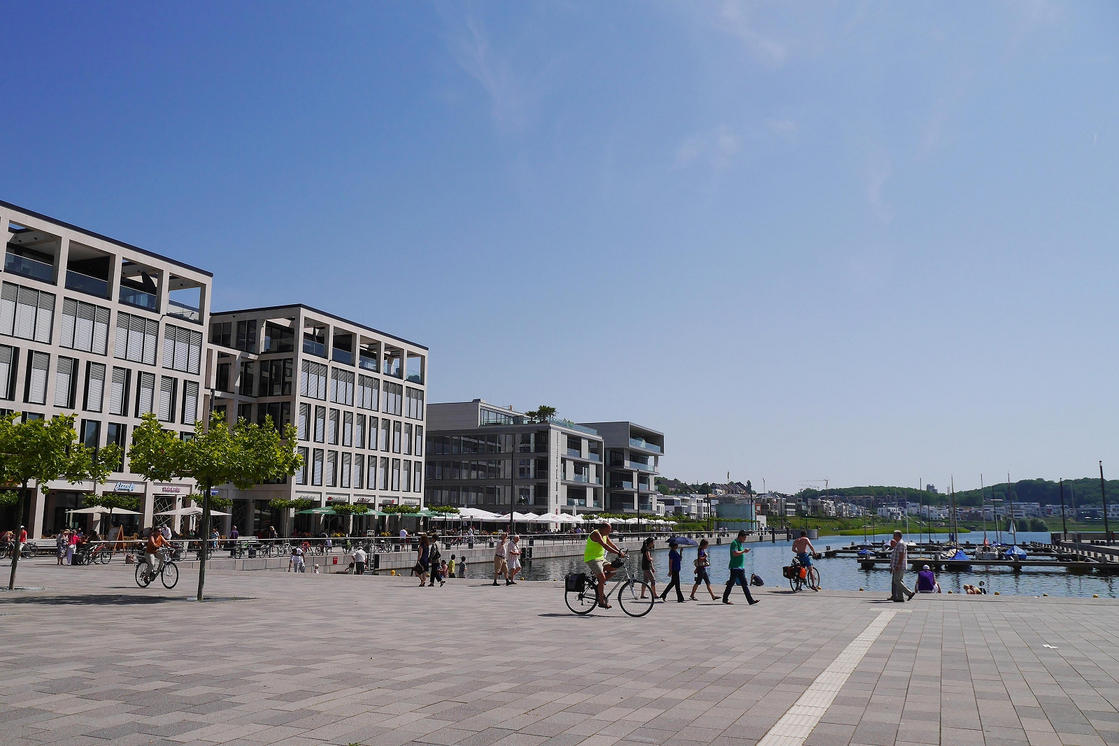 Phönixsee in Dortmund-Hörde